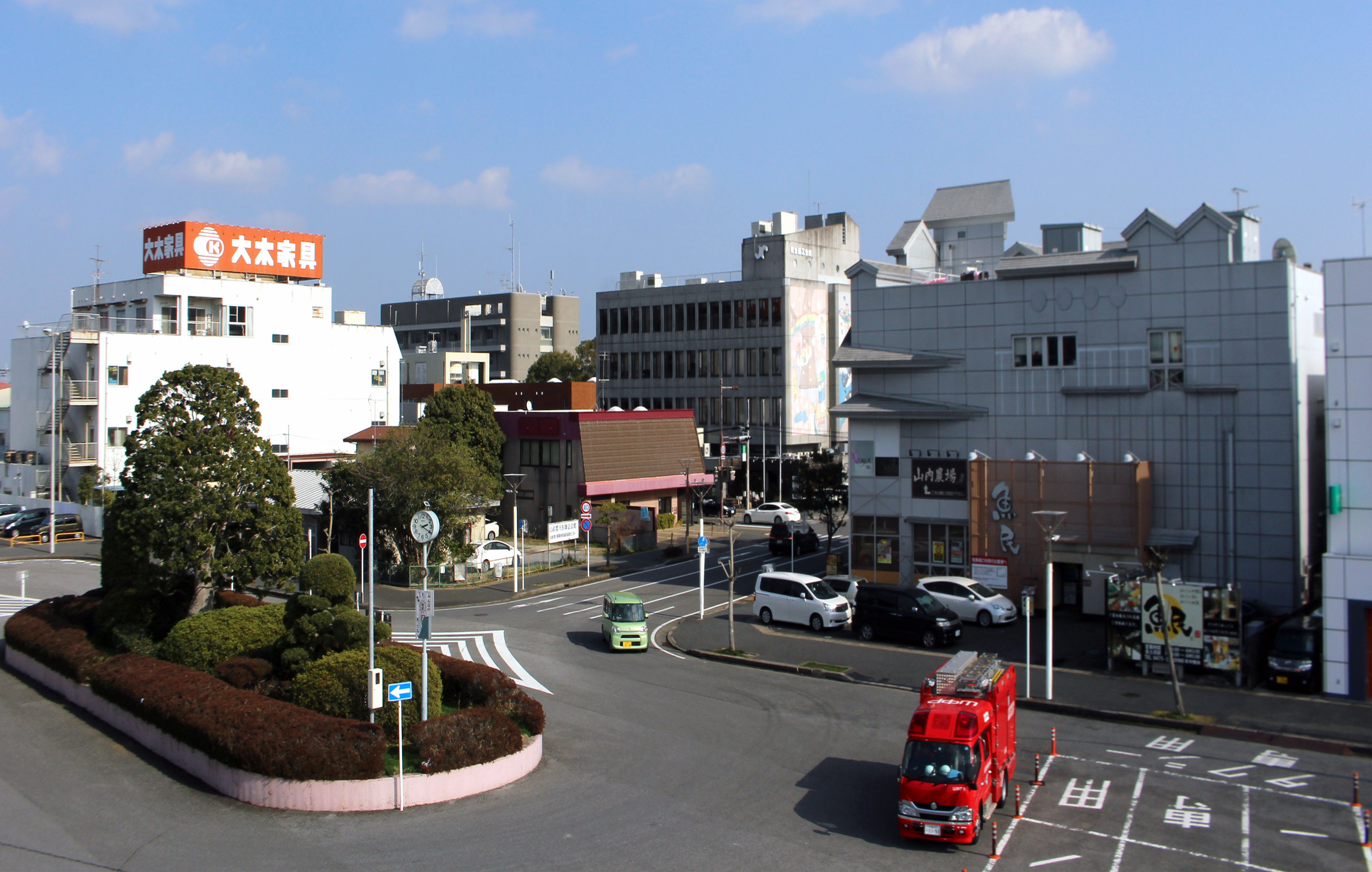 Tōgane Station Rotary East 東口ロータリー